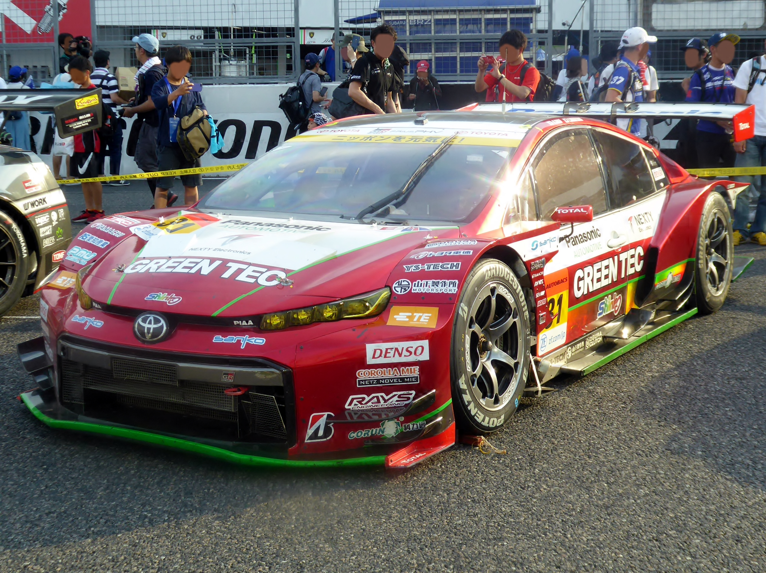 2019年鈴鹿GT300㎞終了後の31号車TOYOTA GR SPORT PRIUS PHV apr GTを撮影。